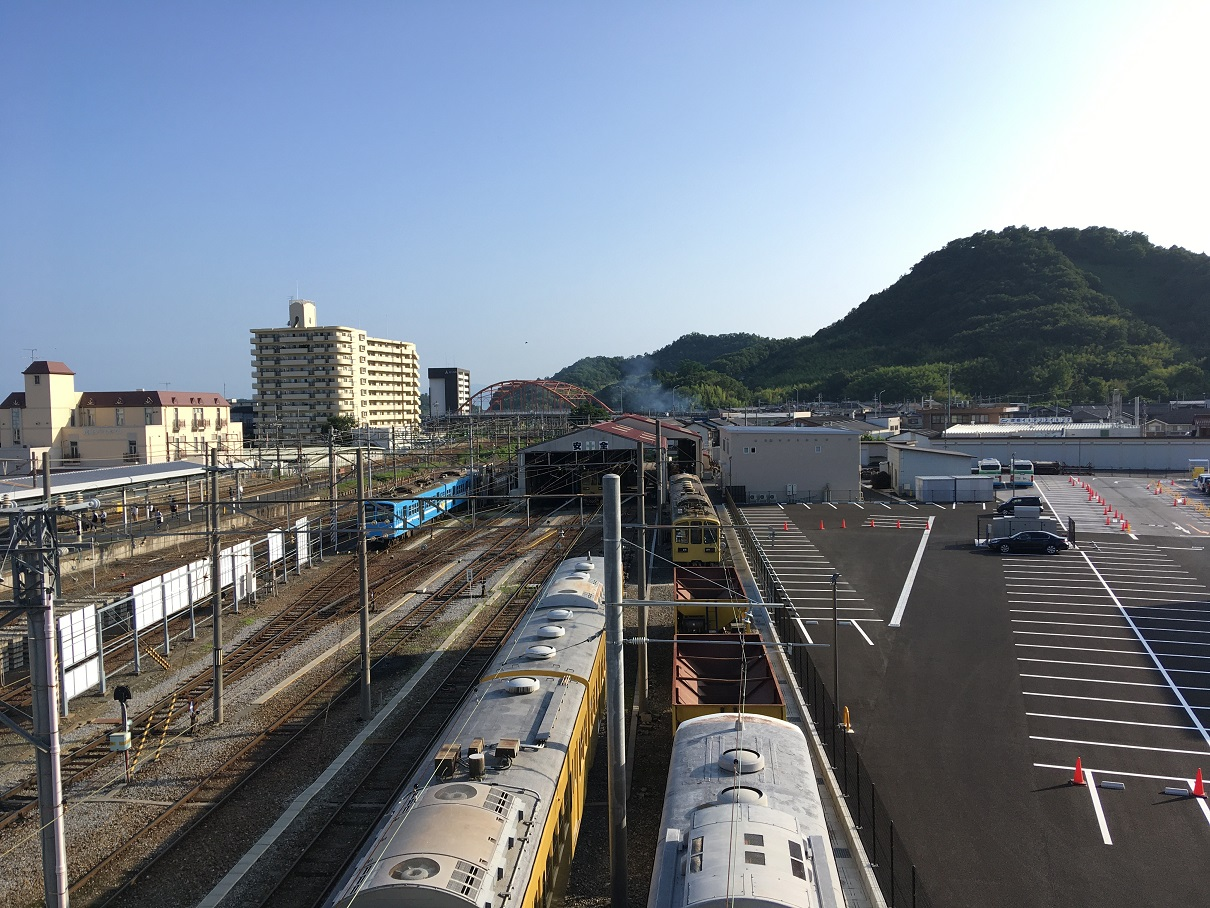 近江鉄道車両基地。写真右側は近江鉄道ミュージアム跡地